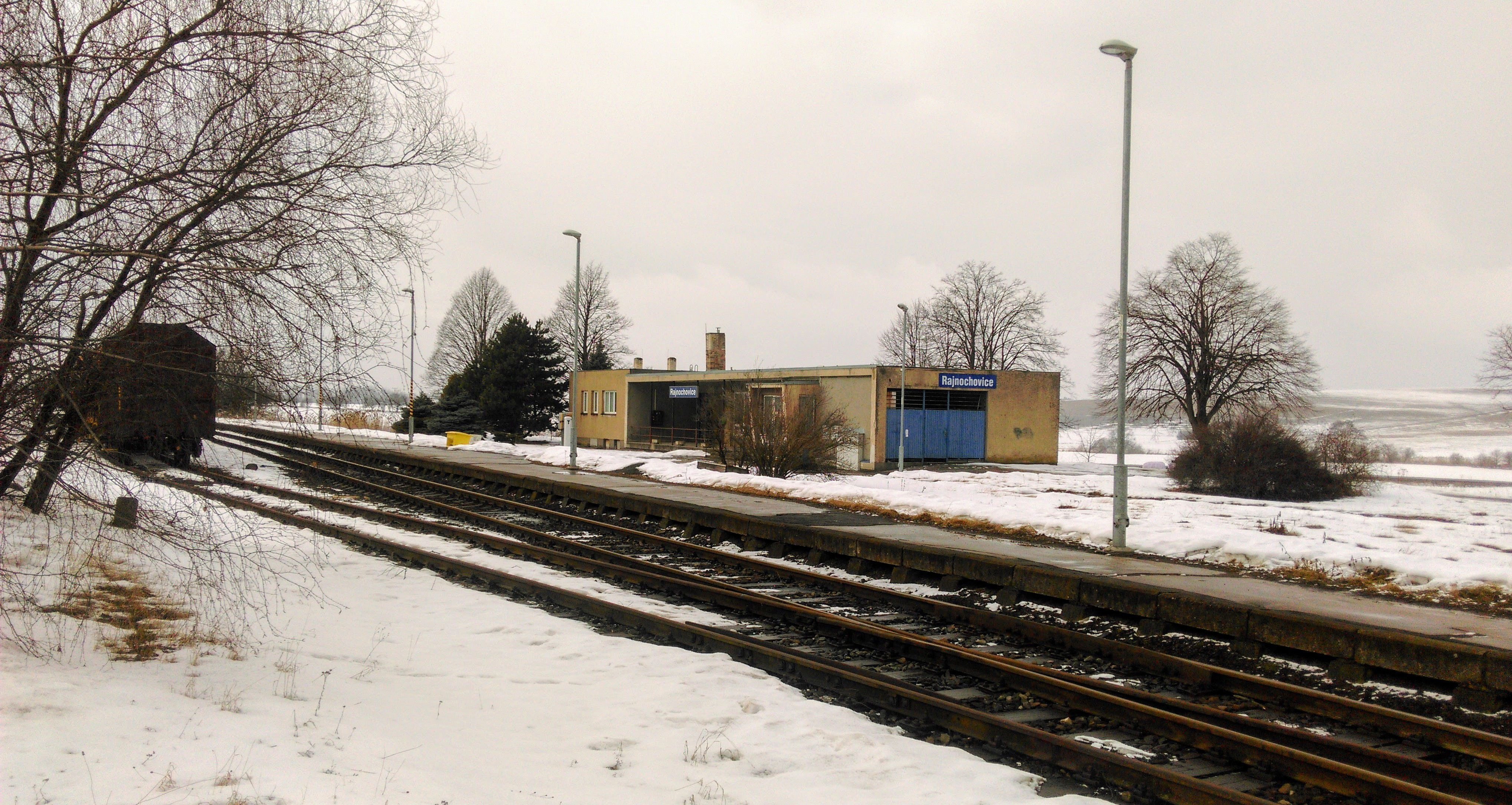 Rajnochovice - železniční zastávka